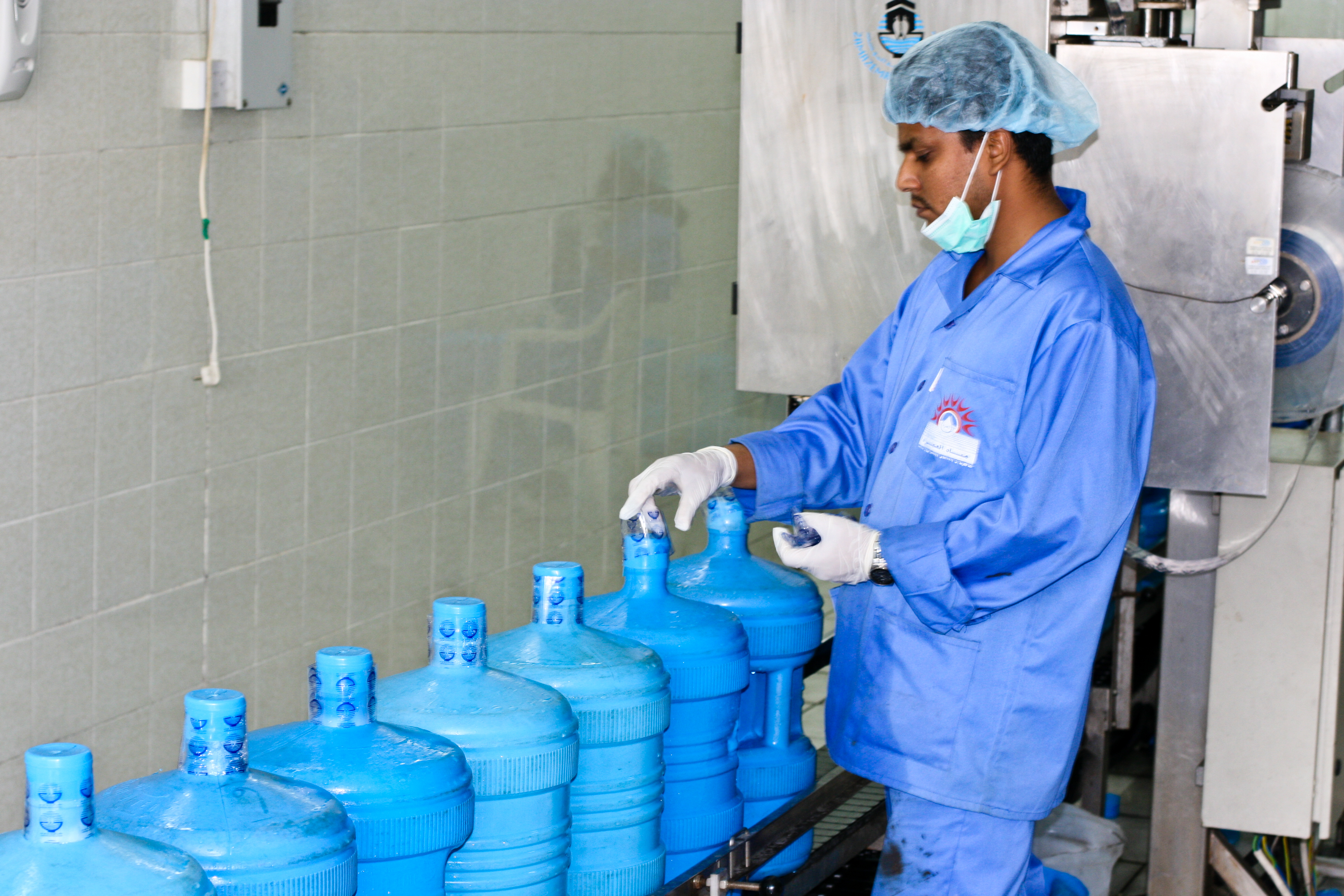 Zamzam water is beeing sealed